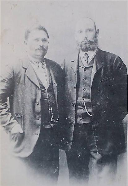 Chernopeev and Sandanski